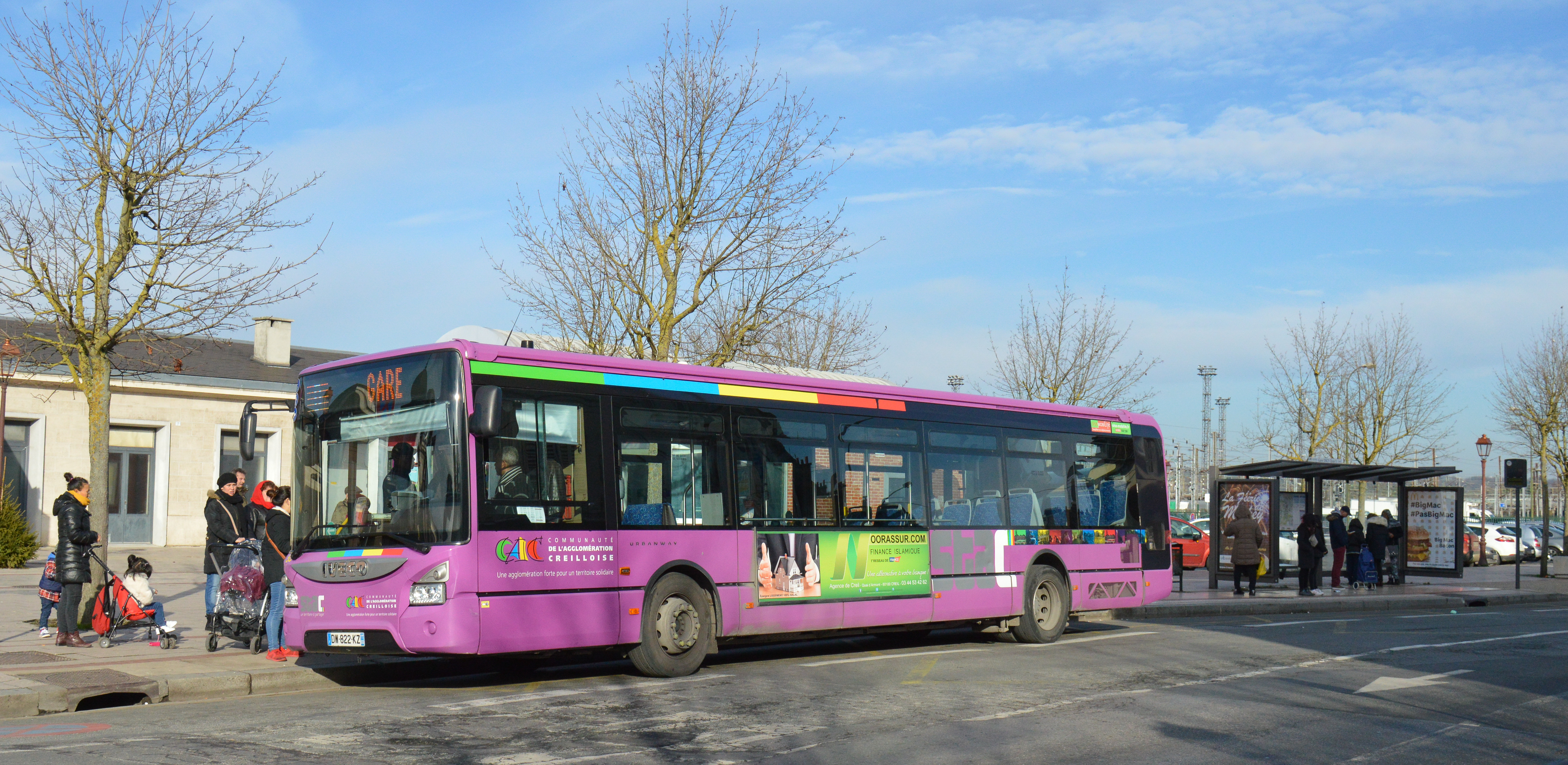 Un bus de type Urbanway 12 devant la gare de Creil, département de l'Oise, France.